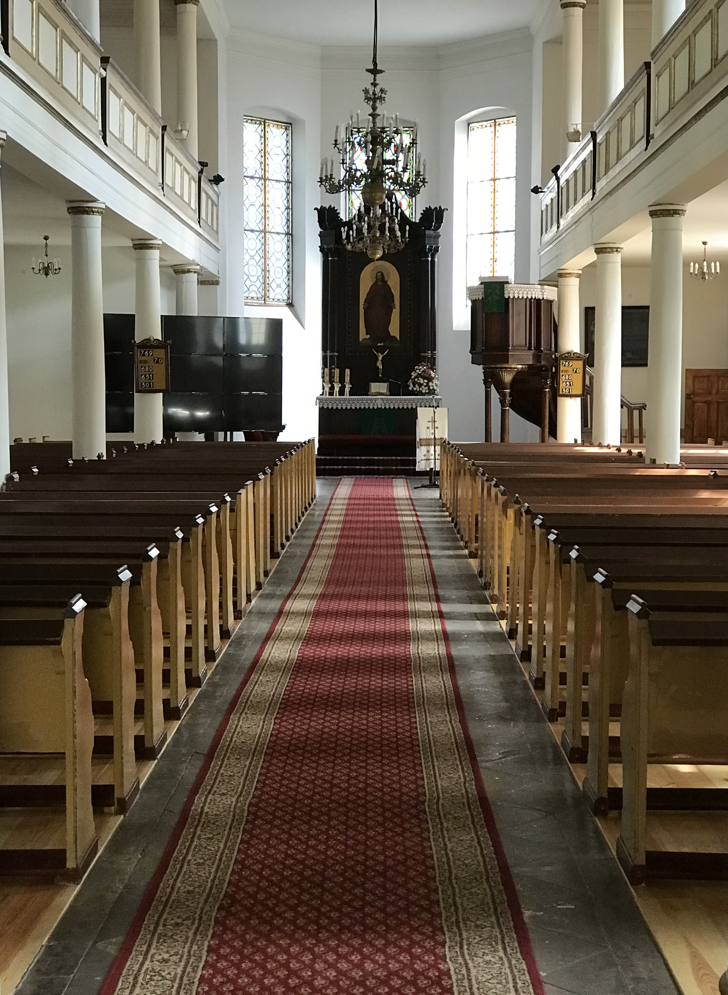 Kościół ewangelicki w Giżycku - wnętrze